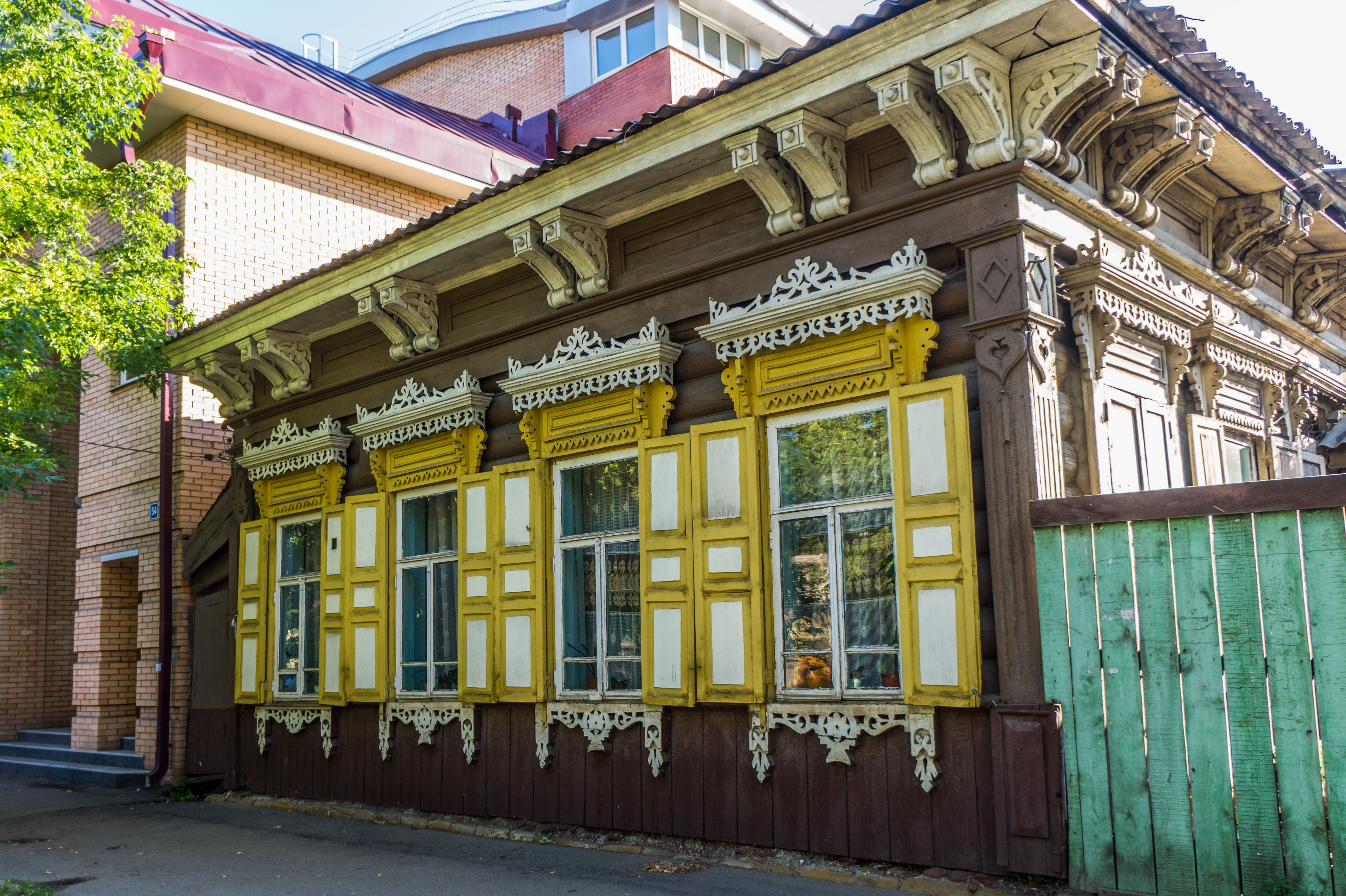 Дом, в котором жил археолог, герой социалистического труда академик А.П. Окладников: улица Горького, 14, Иркутск, Иркутская область